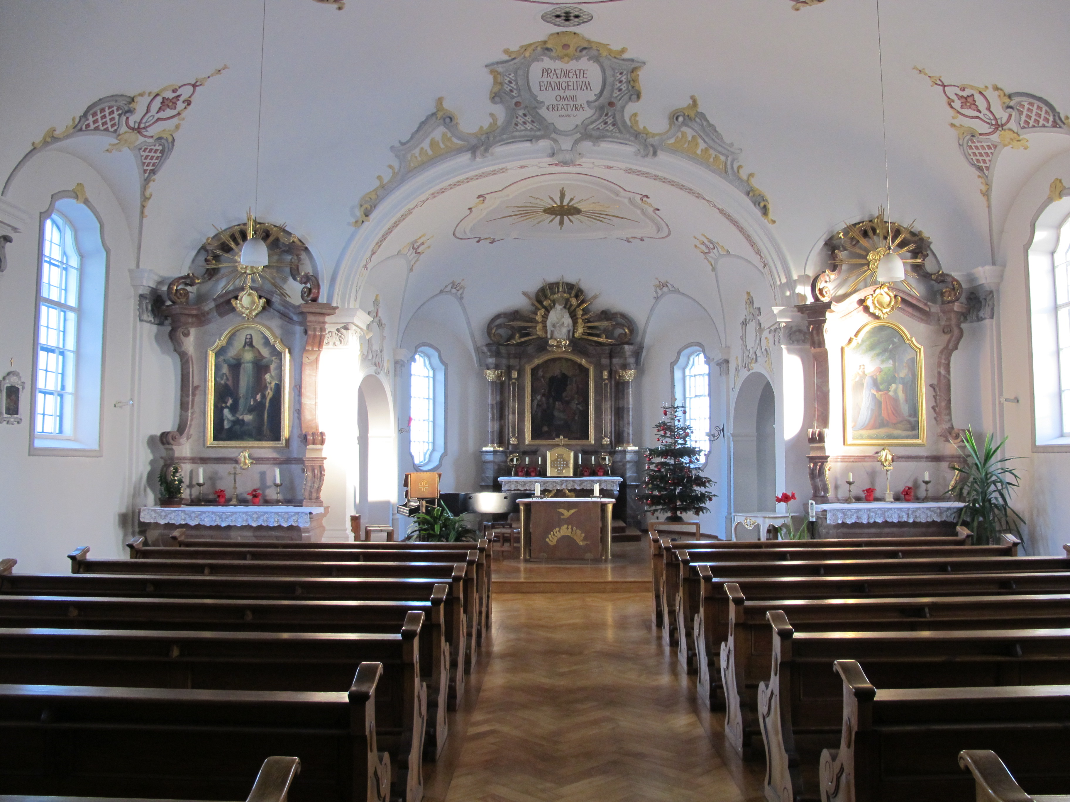 Kapelle des Seminargebäudes in Reimlingen, Schloßstr 2